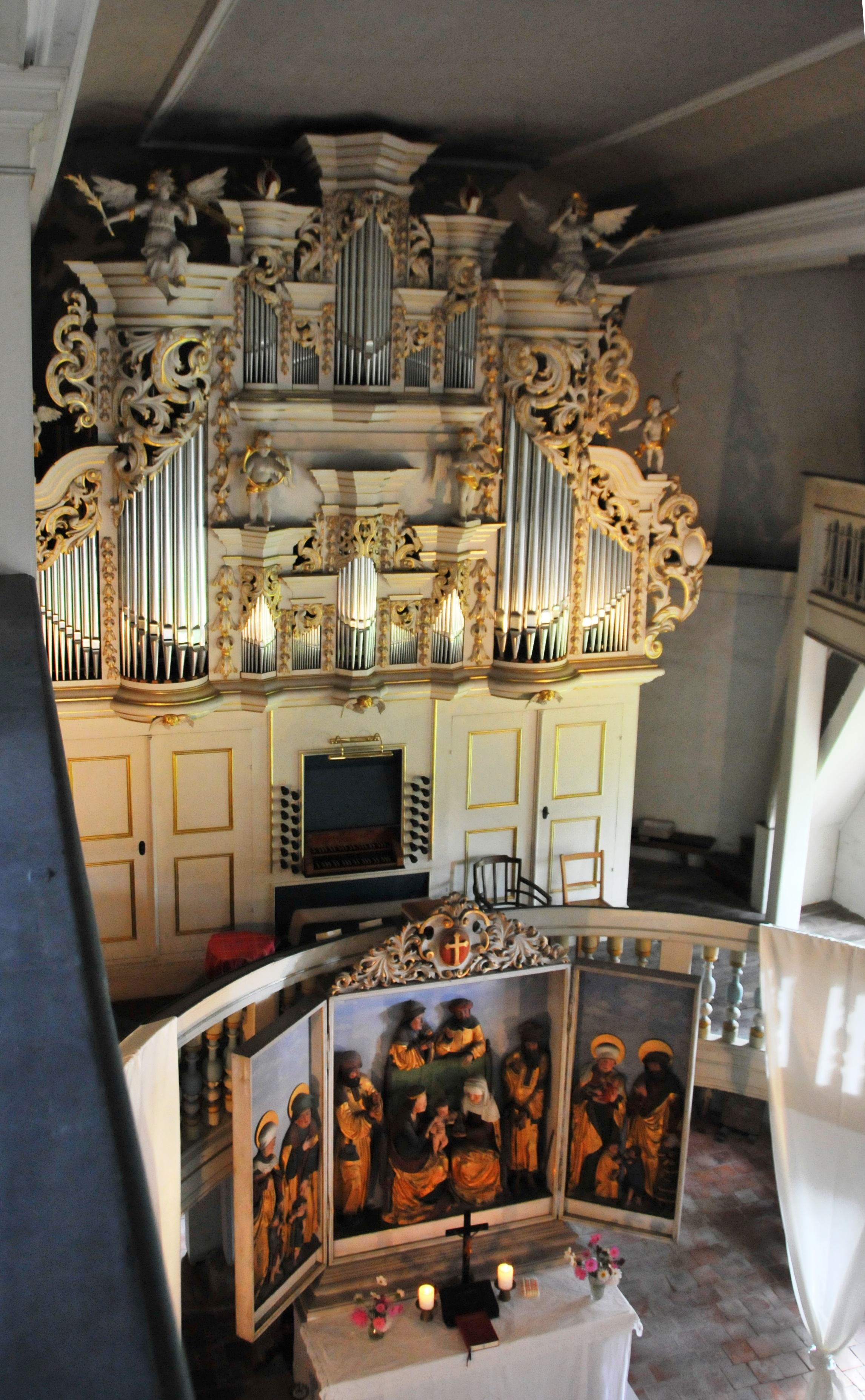 Wandersleben, Kirche